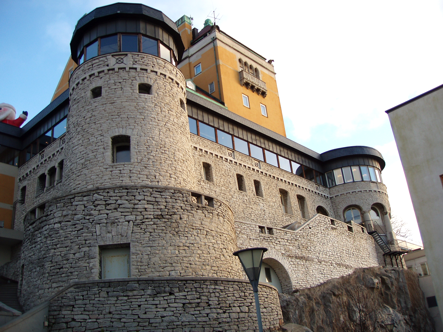 Villa Foresta, Lidingö, Sweden